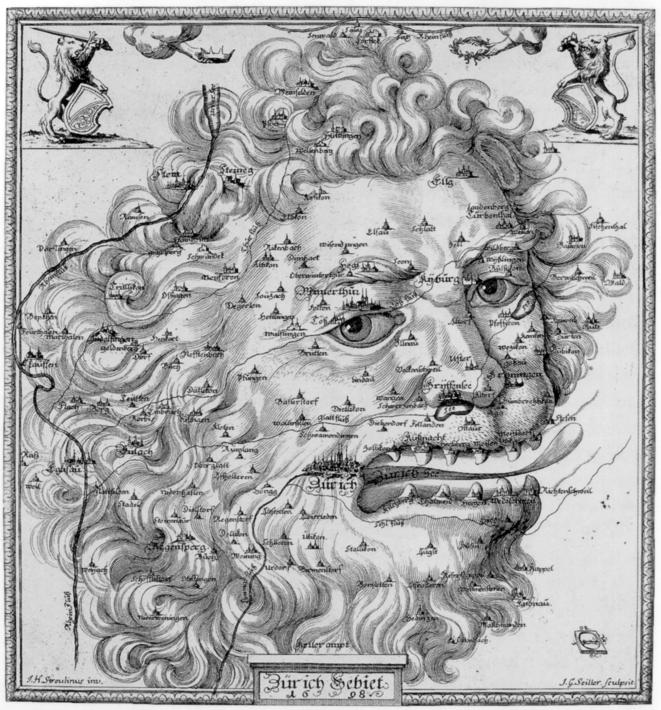 Karte der Stadtrepublik Zürich von 1698. Stich